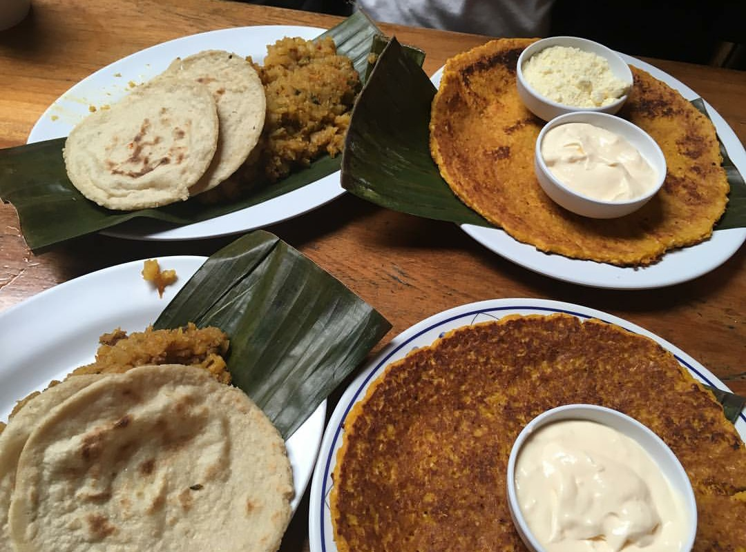 Versión jpg del archivo Archivo:Chorreadas y picadillo CR.png